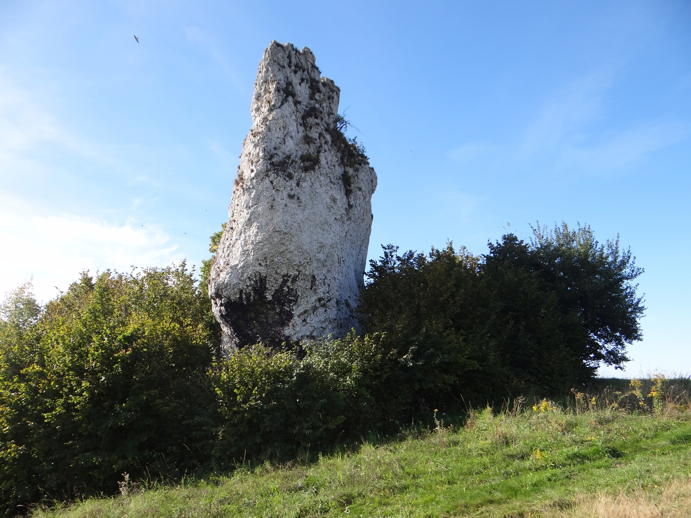 Skała Ostry Kamień w grupie skał na wzgórzu 502 w Jerzmanowicach